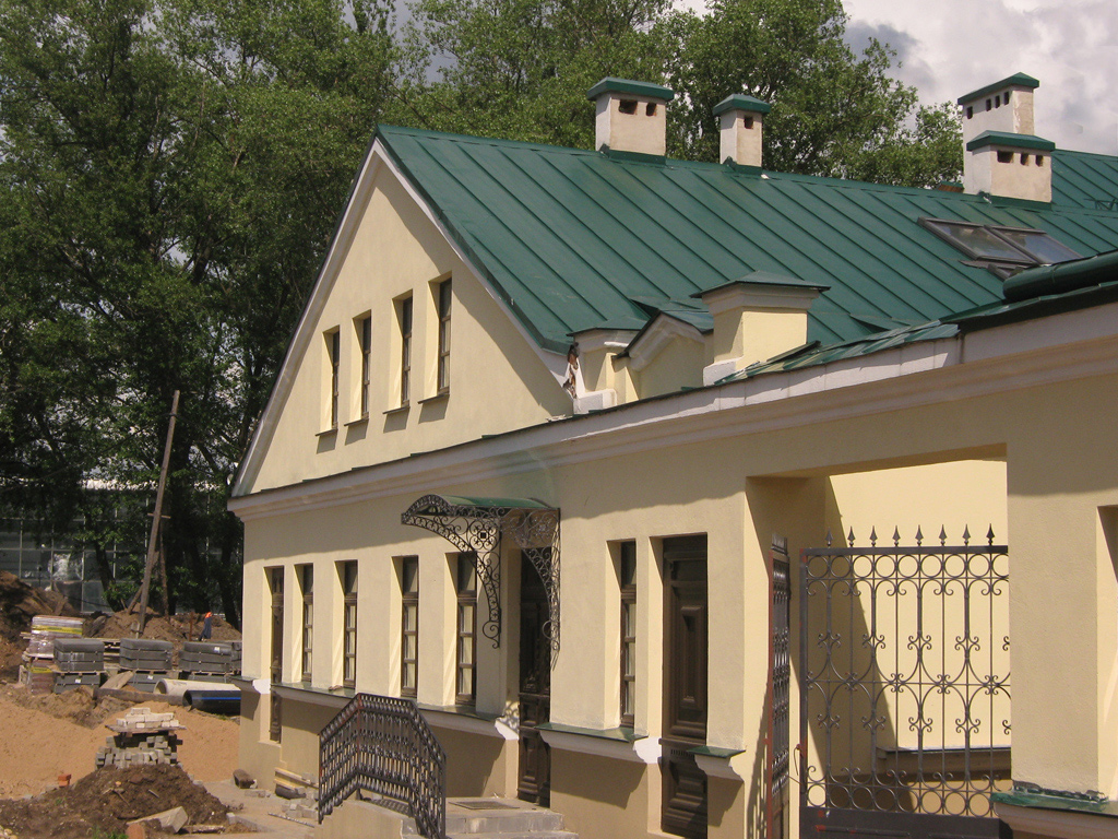 Мінск. Вуліца Герцэна, 12